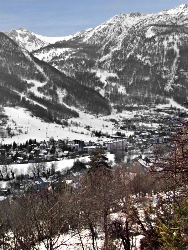 Vue du chemin du Puy Chirouzan : hameaux de Villeneuve et de la Salle commune de la Salle les Alpes (Hautes-Alpes) Au fond, pistes du domaine skiable de Serre-Chevalier (celles que l'on voit sur la photographie font partie de la commune de la Salle-les-Alpes). Au centre, le hameau de Villeneuve. A droite, le hameau du Bez. Devant (un peu caché par les arbres), le hameau de la Salle.